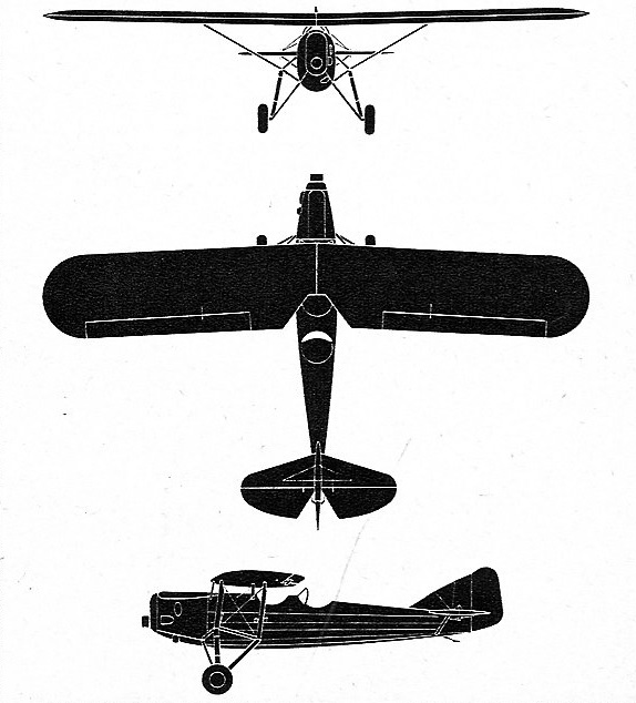 L'Iris d'Edmond Abraham